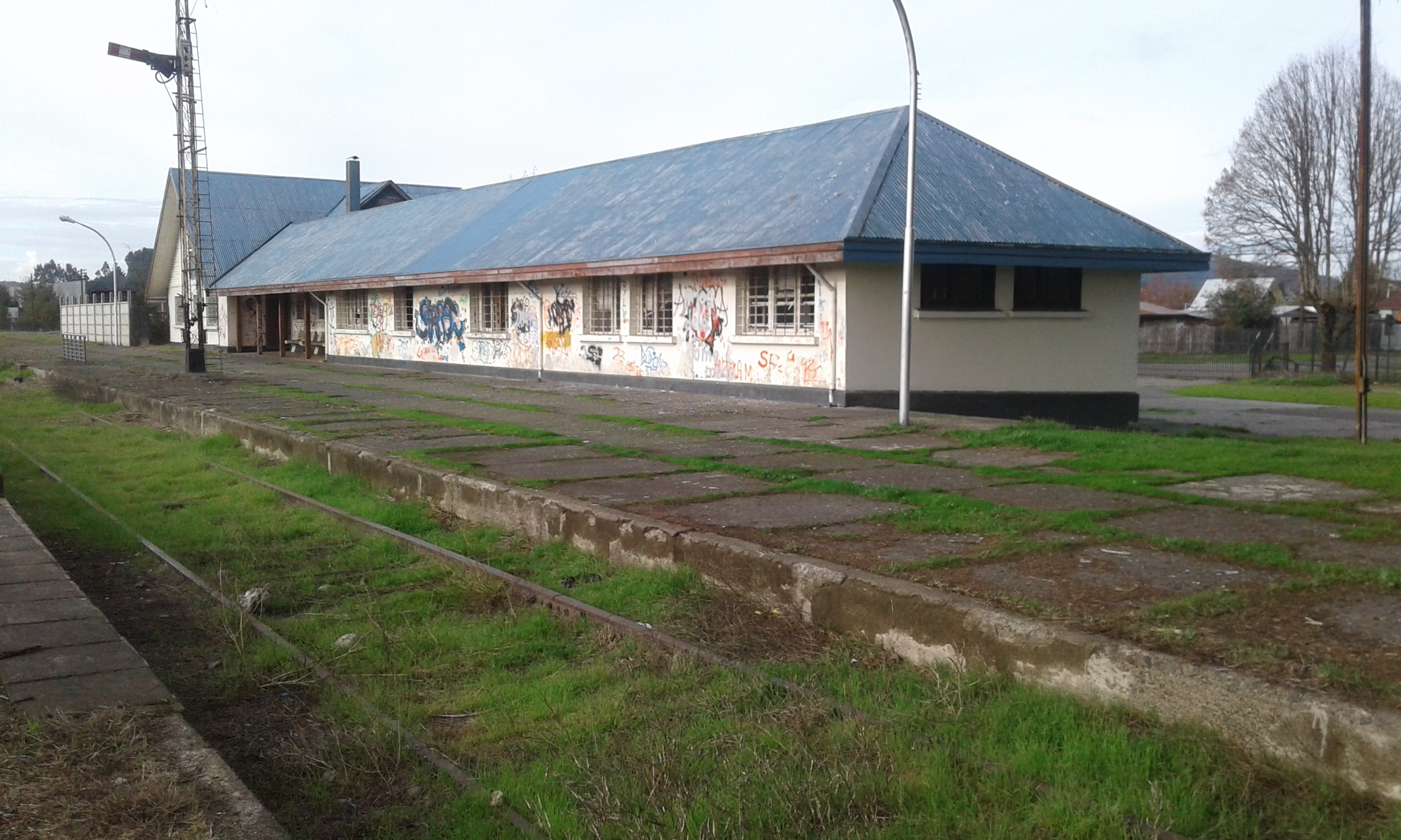 Edificio de la Estación de Lanco, Región de Los Ríos, Chile